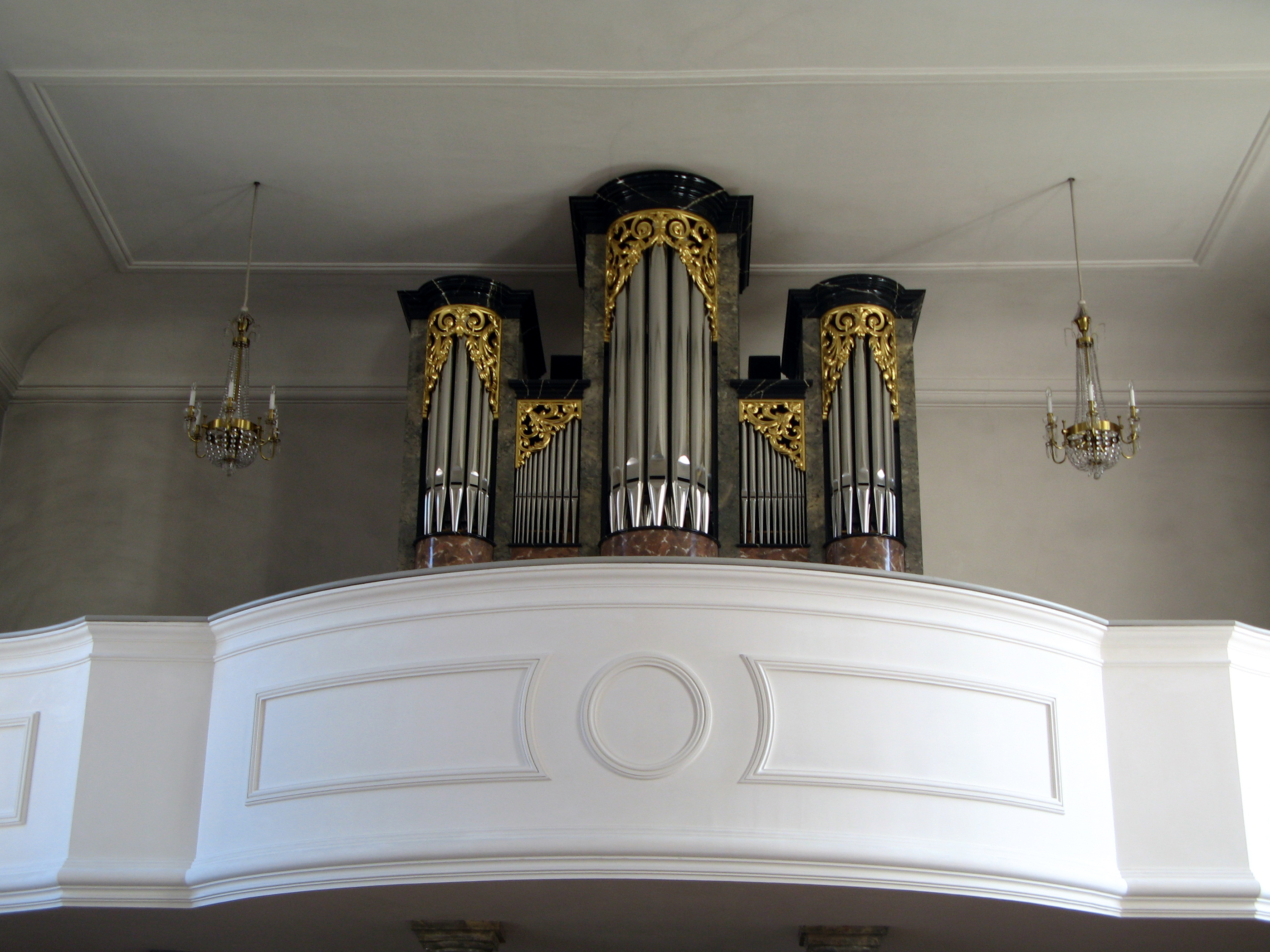 Pfarrkirche St. Germanus in Abtwil, Empore mit Orgel